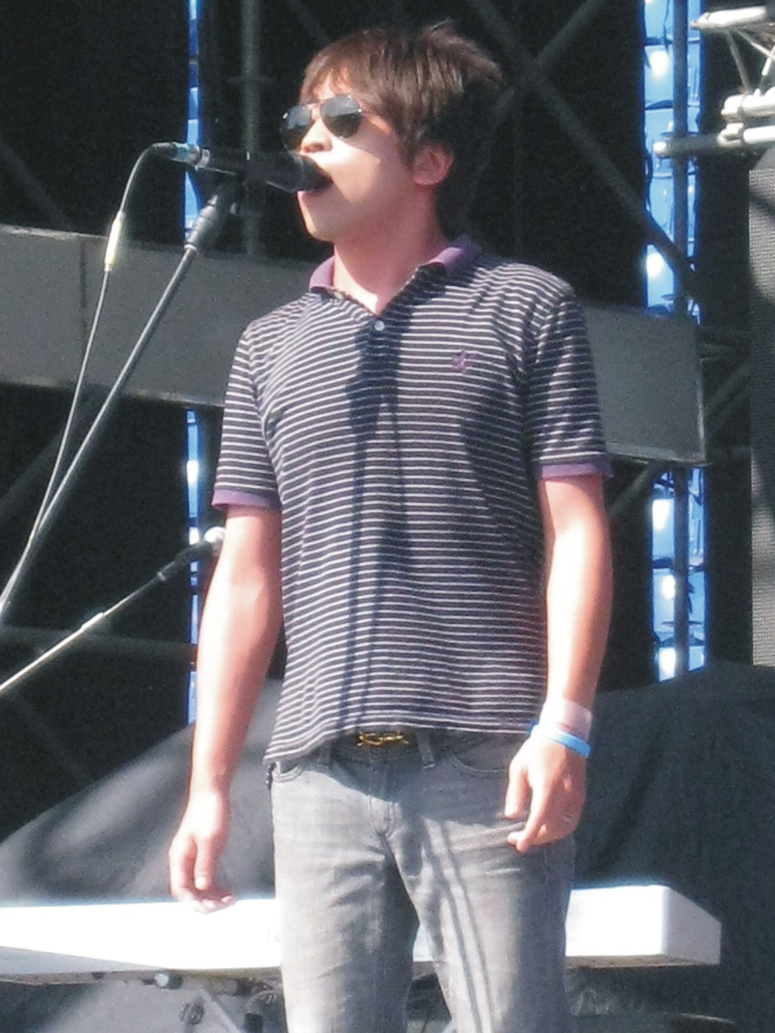 1976樂團主唱陳瑞凱(阿凱)，2009年於桃園縣立體育場「Music Terminals 2009 音樂航空站」音樂祭。